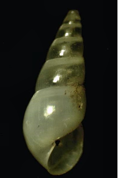 Auristomia fusulus (Monterosato, 1878) (synonym: Odostomia fusulus Monterosato, 1878), family Pyramidellidae; Sicily